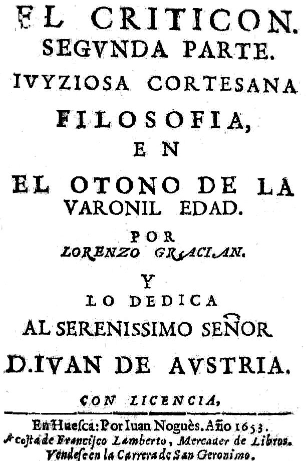 Segunda parte del Criticón de Baltasar Gracián